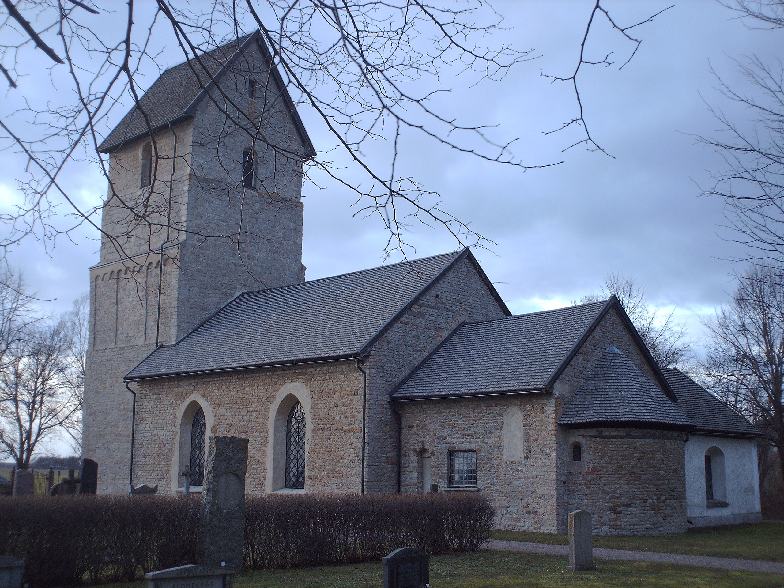 Herrestad kyrka, Vadstena, Östergötland.